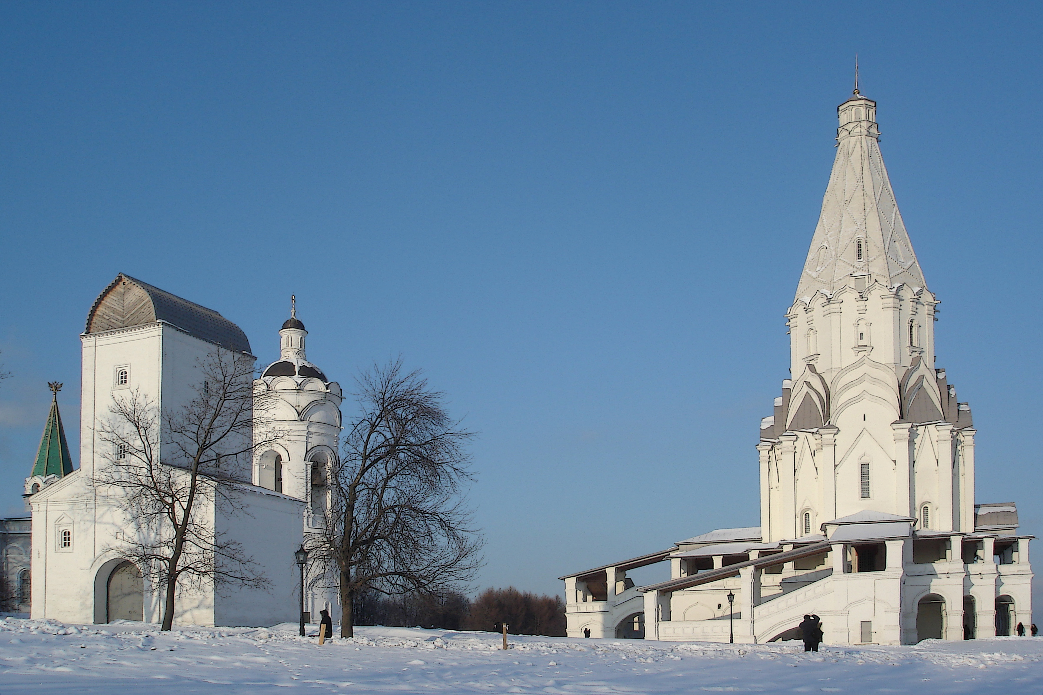 Вид от Волосова оврага